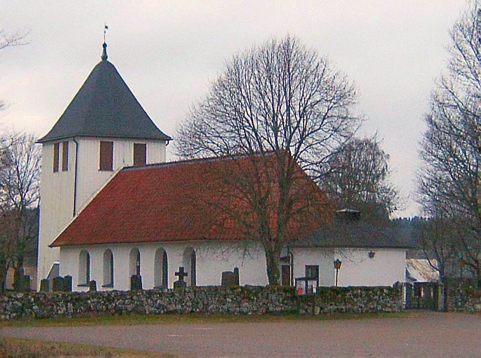 Svartrå kyrka